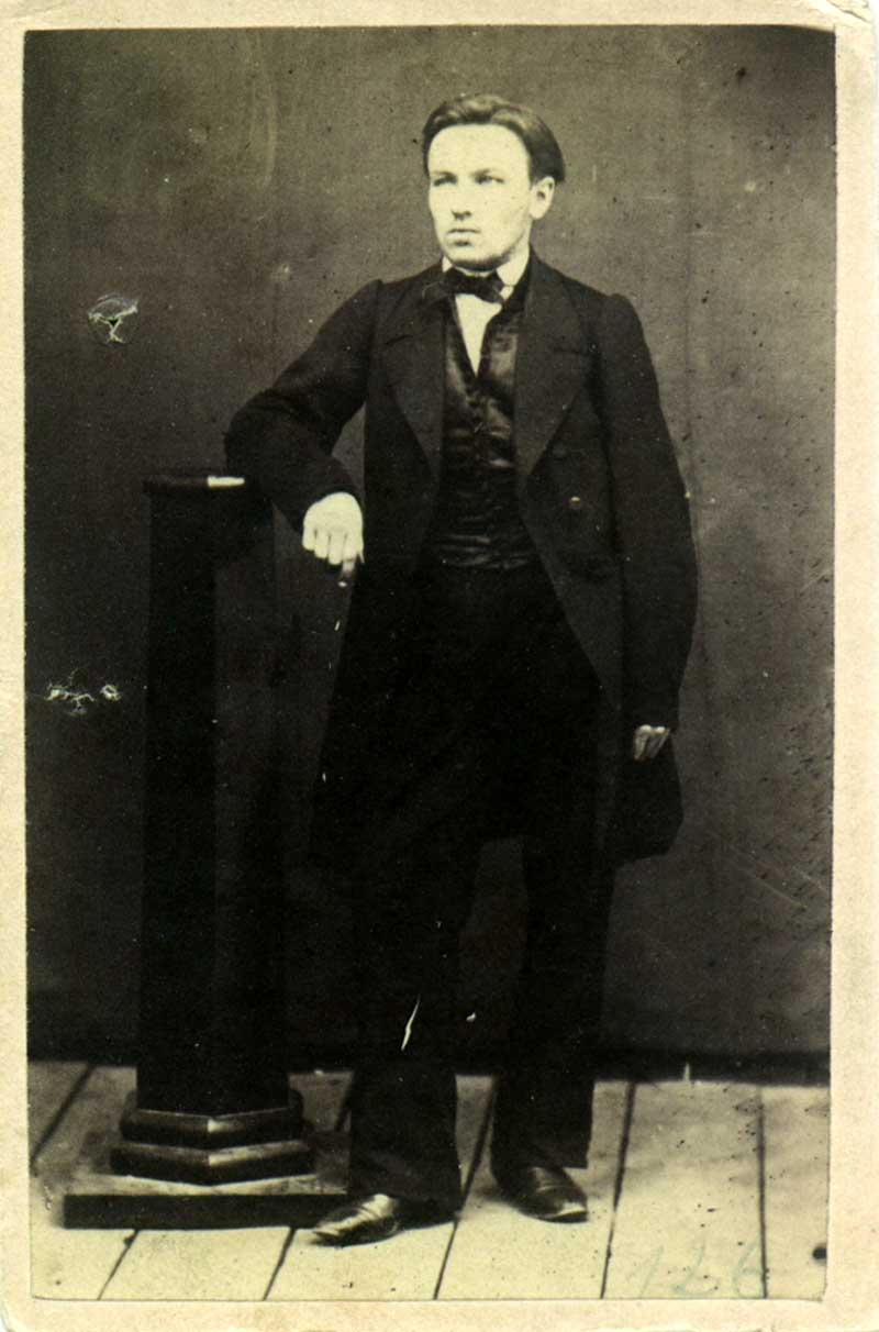 Беларуская (тарашкевіца): Партрэт Кастуся Каліноўскага (Kastuś Kalinoŭski) (?) [1]